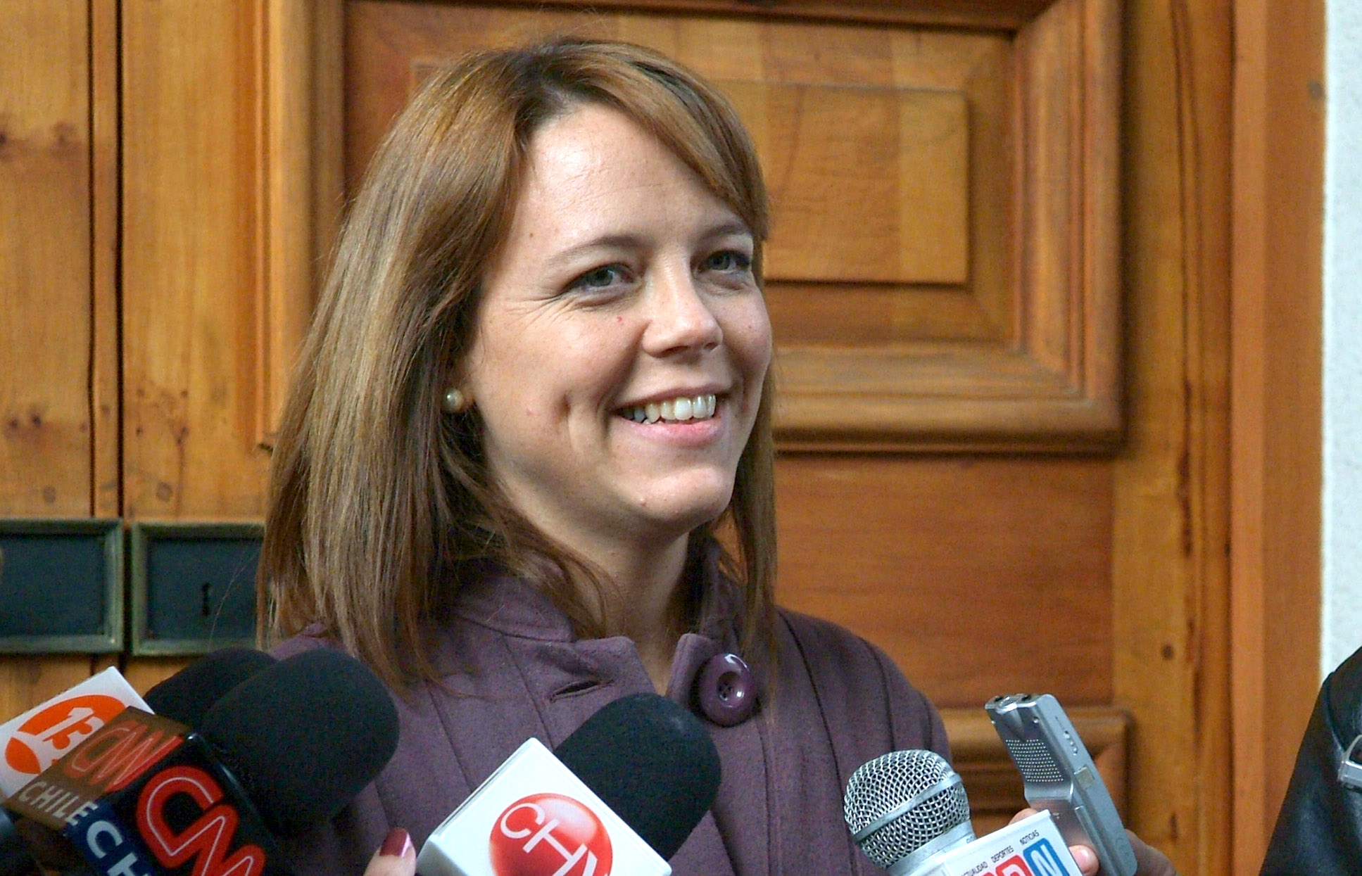 Ministerio Secretaria General de Gobierno,Ena von Baer,Palacio de La Moneda.